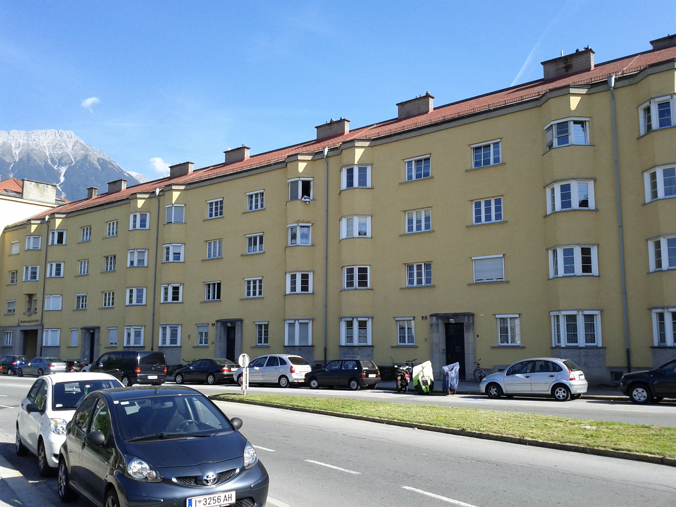 Kommunaler Wohnbau, Pembaurblock, Innsbruck